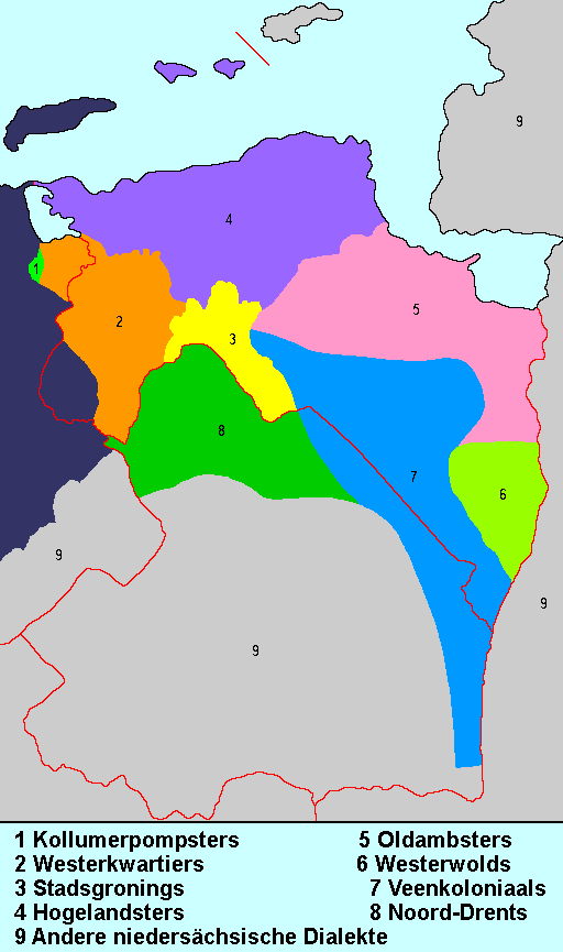 Karte der verschiedenen Dialekten des Gronings (niedersächsische Dialektgruppe in den nordöstlichen Niederlanden)